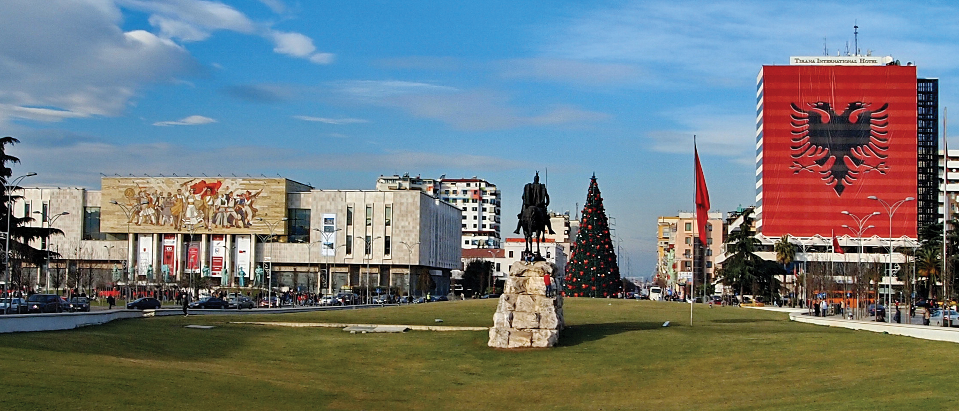 Sheshi Skenderbeut (Tiranë)